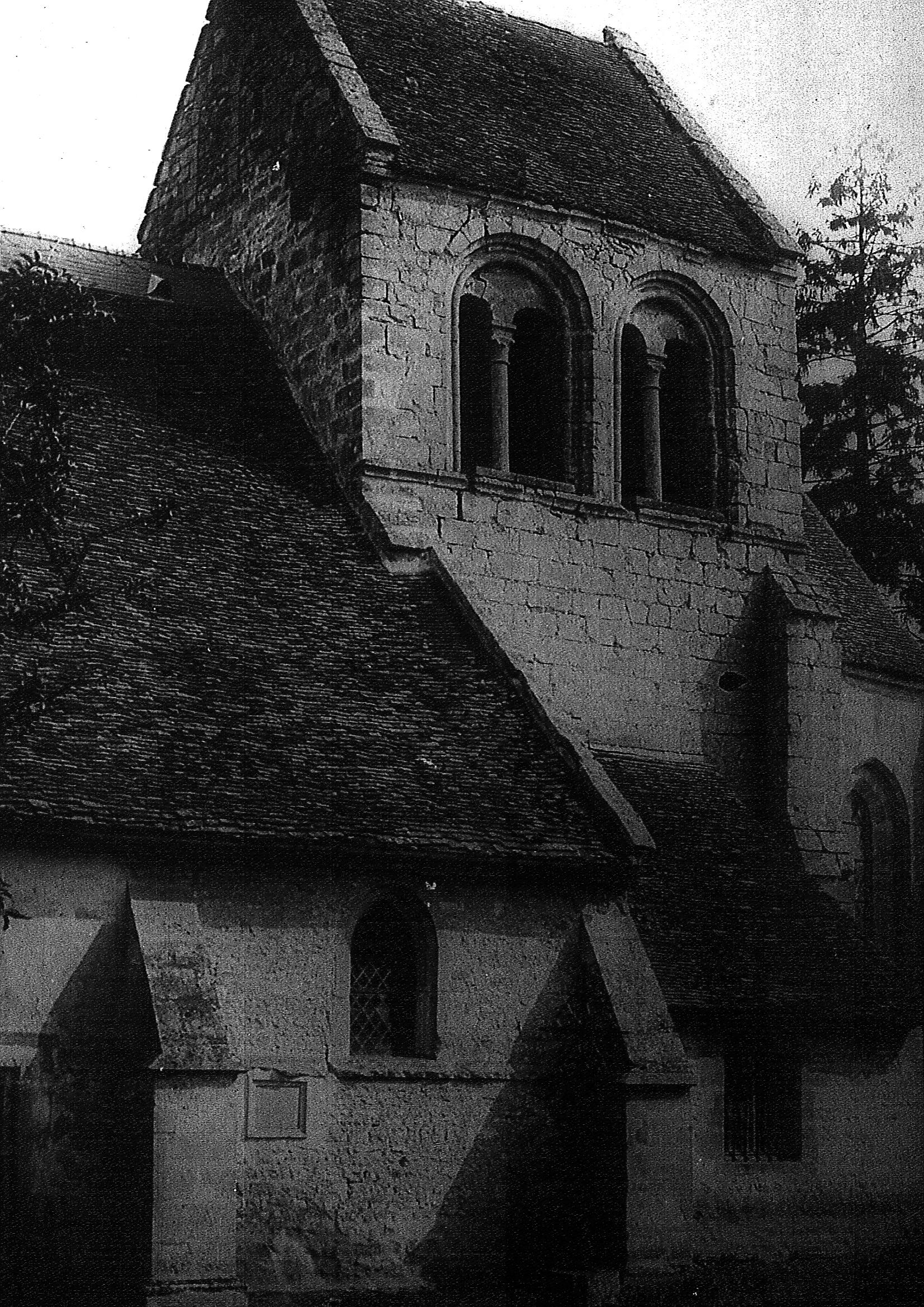 issu du fonds iconographique de reims.